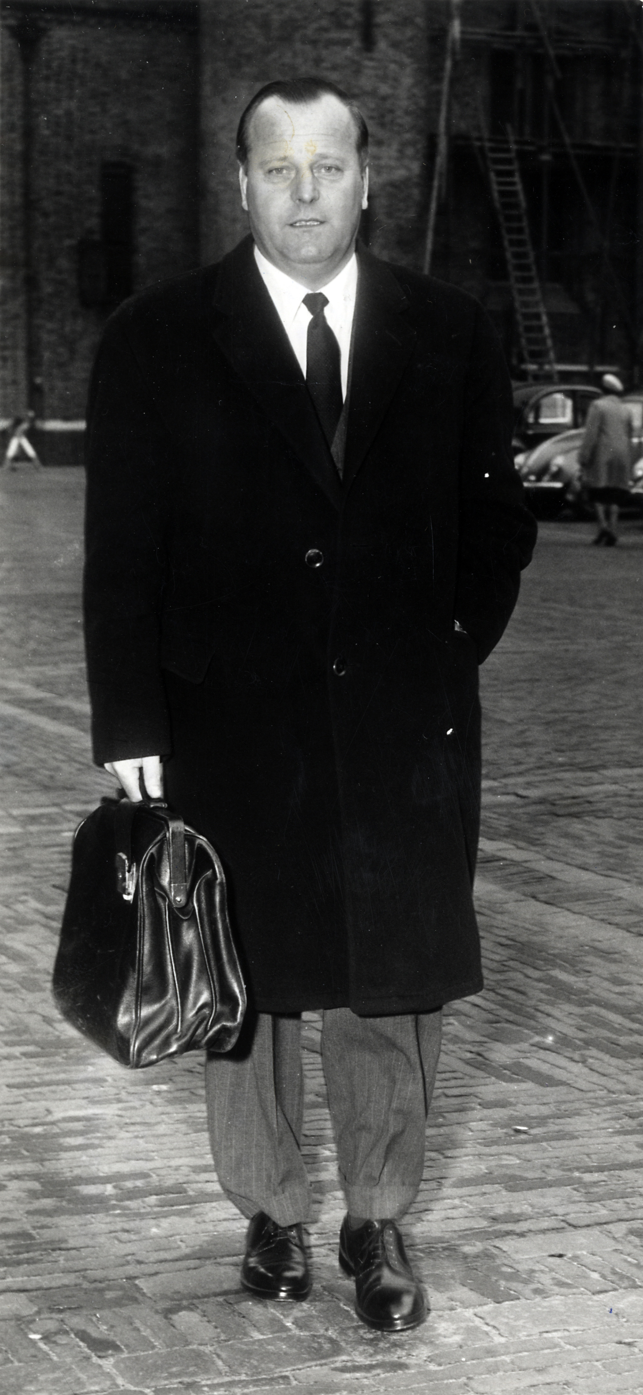 Blaisse, P.A. (KVP). KVP-Tweede Kamerlid mr. P.A. Blaisse gaat op bezoek bij kabinetsformateur prof. de Quay. Nederland, Den Haag, 10 april 1959.